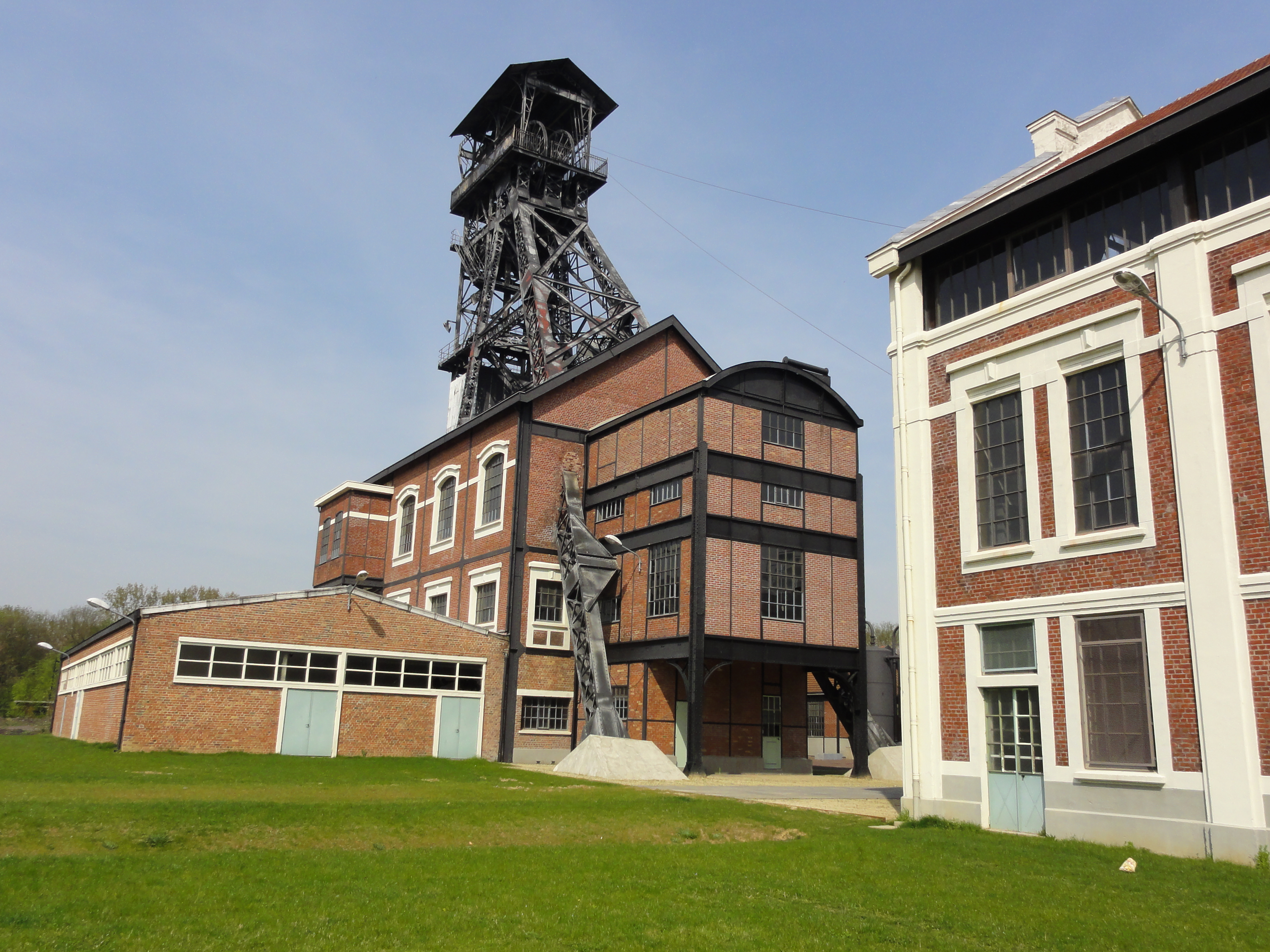 This building is en partie classé, en partie inscrit au titre des Monuments Historiques. .